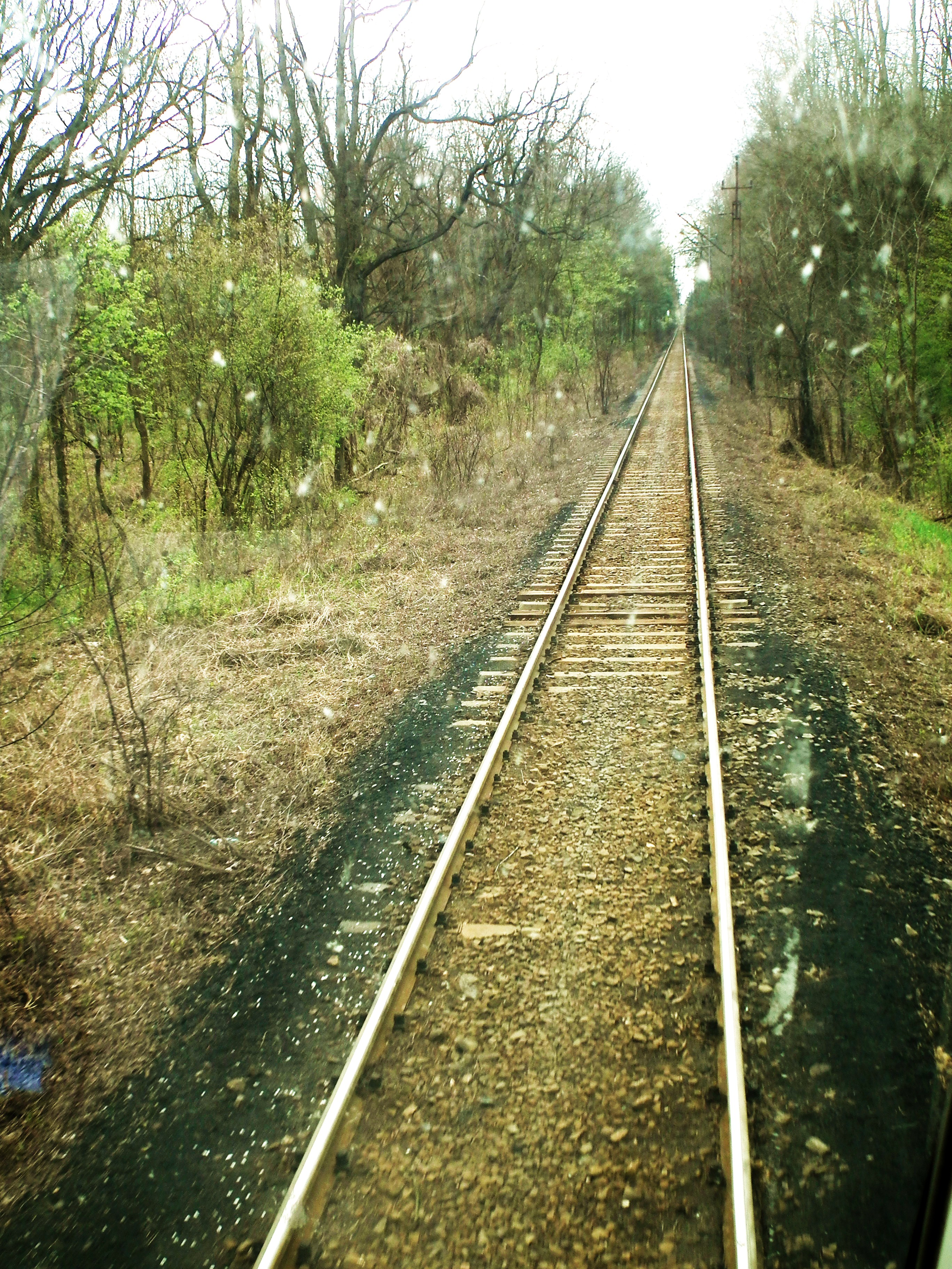 Odcinek linii kolejowej 289 Koźlice - Rudna Miasto.